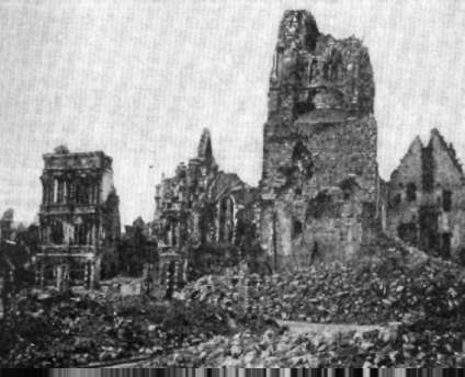 Az arrasi városháza romjai az 1914. október 1. - 4. között vívott arrasi csata után